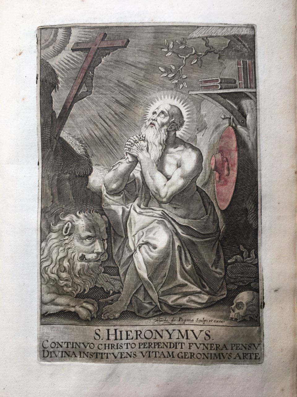 Estampa suelta procedente de una colección facticia de estampas ca. 1614-1618. Medidas plancha 130 x 198 mm.